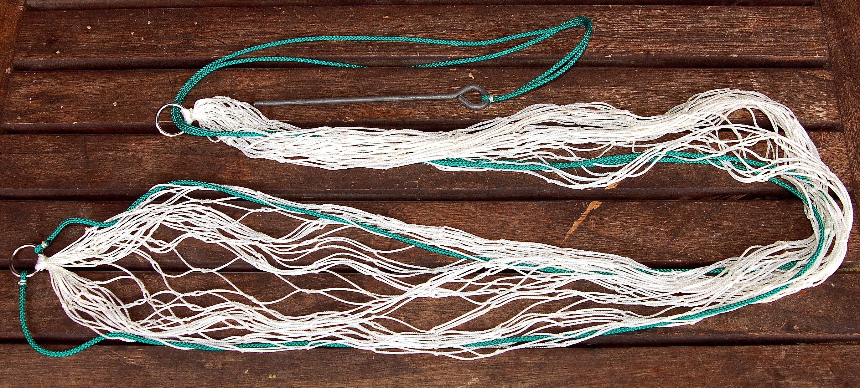 Sprengnetz für den Kaninchenfang (vermutlich in Deutschland)